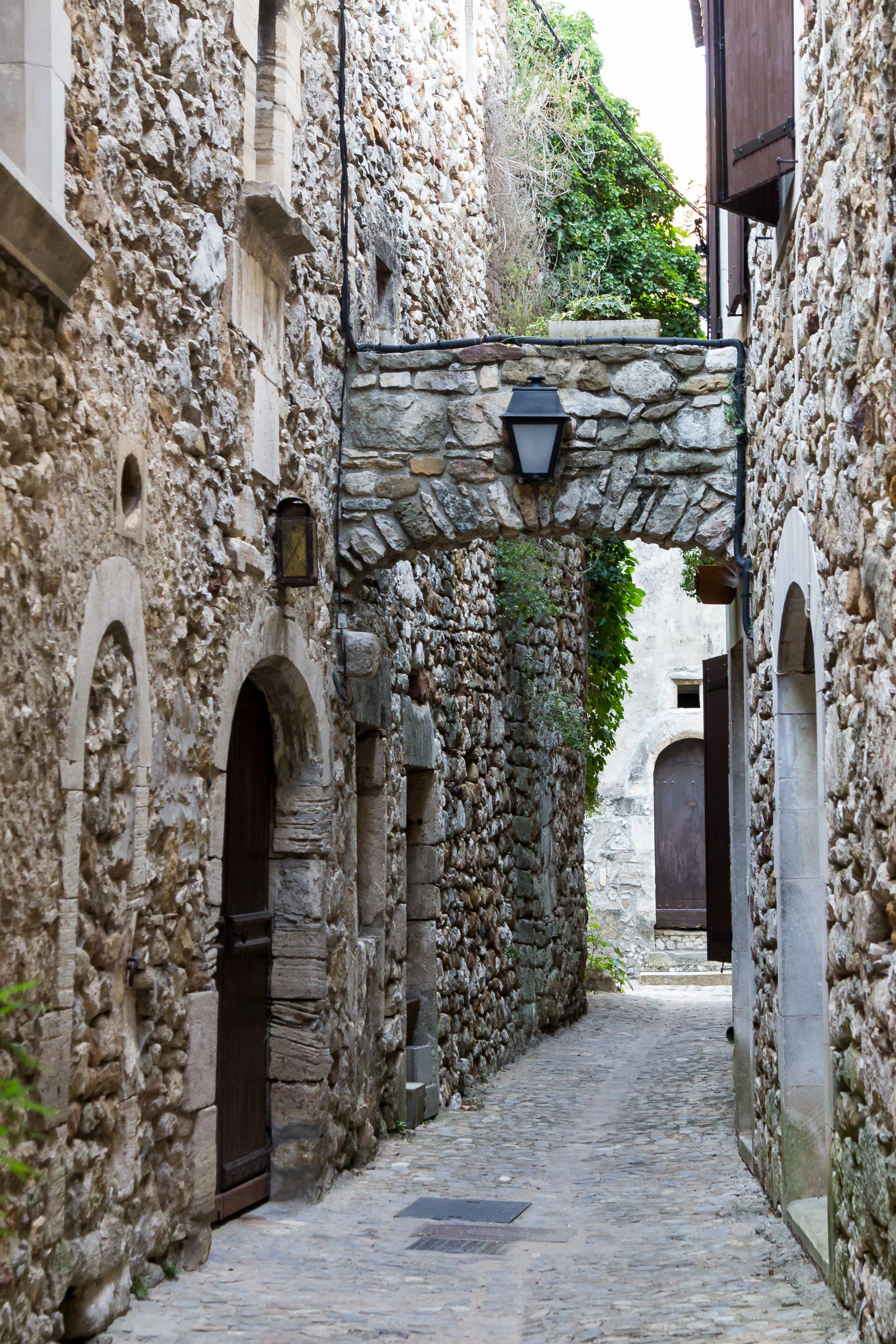 Gasse in Aiguèze, Frankreich